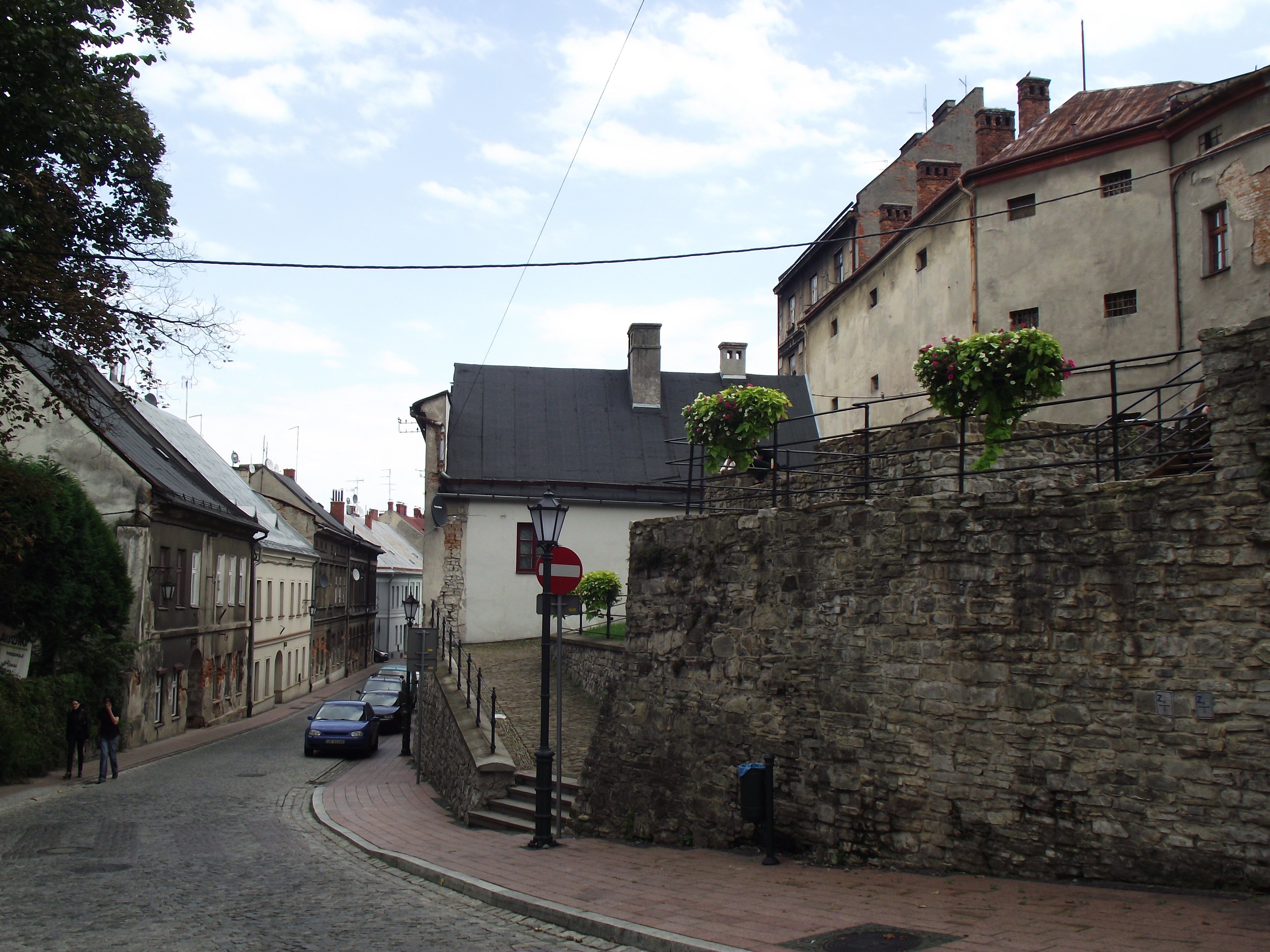 Bielsko-Biała, Stare Miasto - mury miejskie i ul. Orkana.